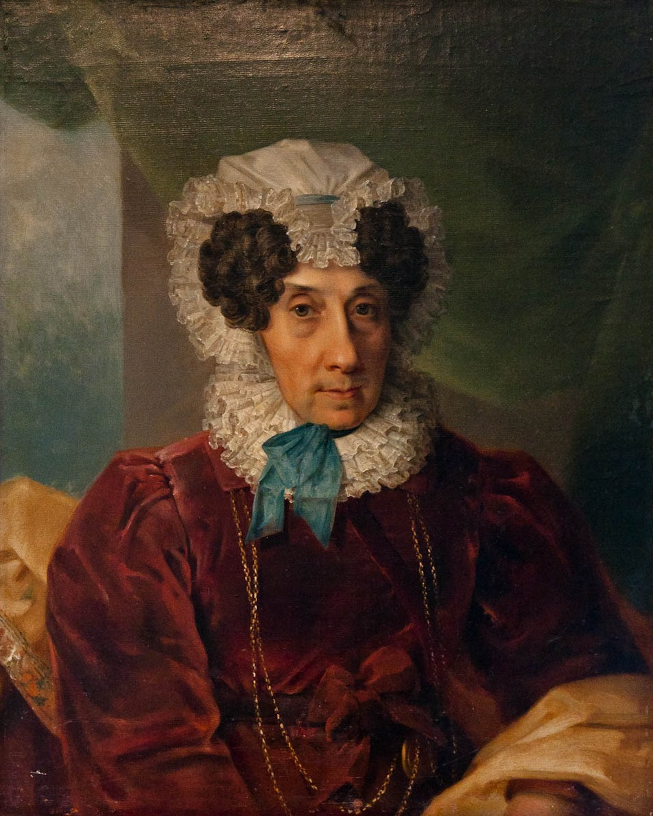 Н.К.Загряжская (1747-1837)